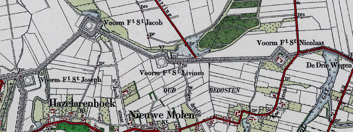 Linie van Communicatie tussen Hulst en Sas van Gent (deel1)